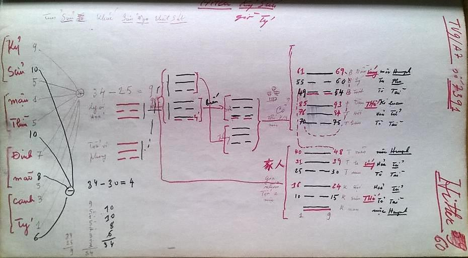 HLHitler